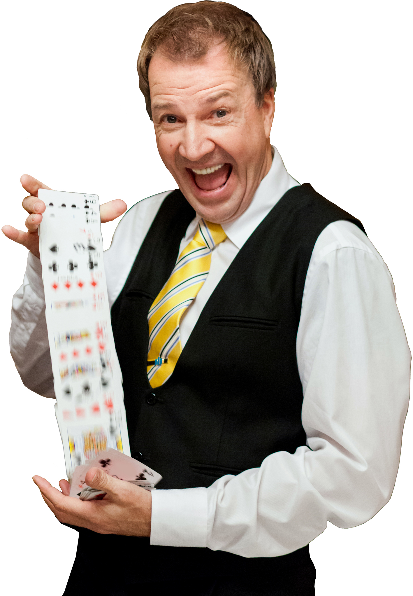 Jarmo Luttinen